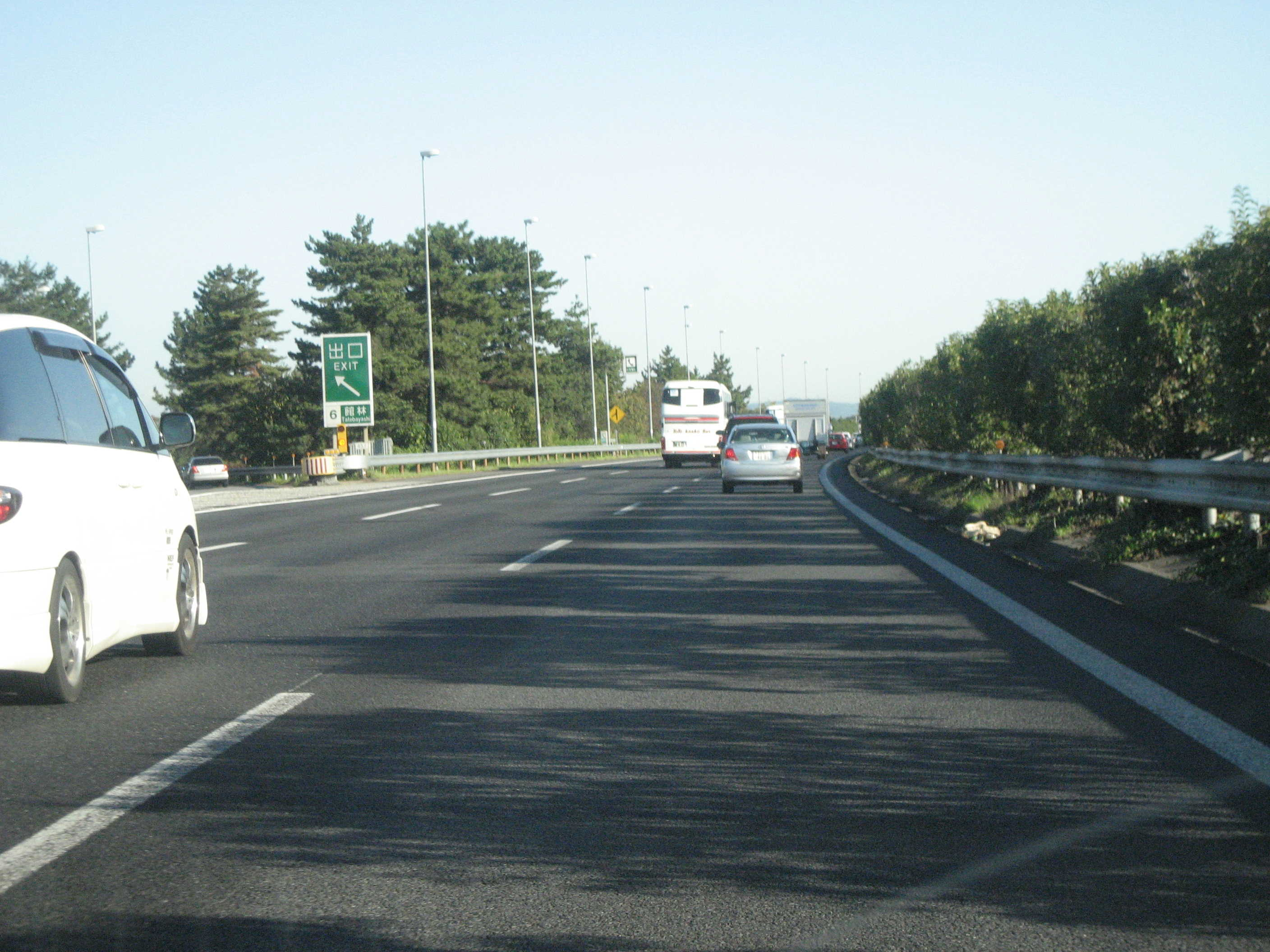 東北道館林インター